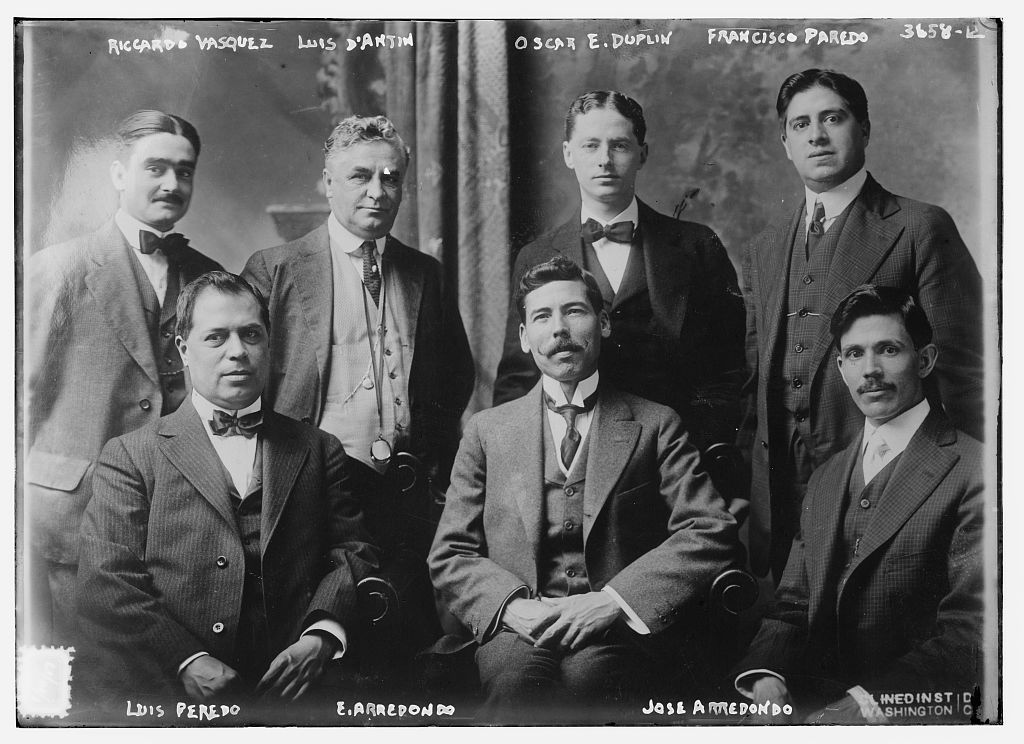 Depicted people: Ricardo Vasquez, Louis D'Anjin, Oscar E. Duplin, Francesco Peredo, José Arredondo, Eliseo Arredondo and Luis Peredo